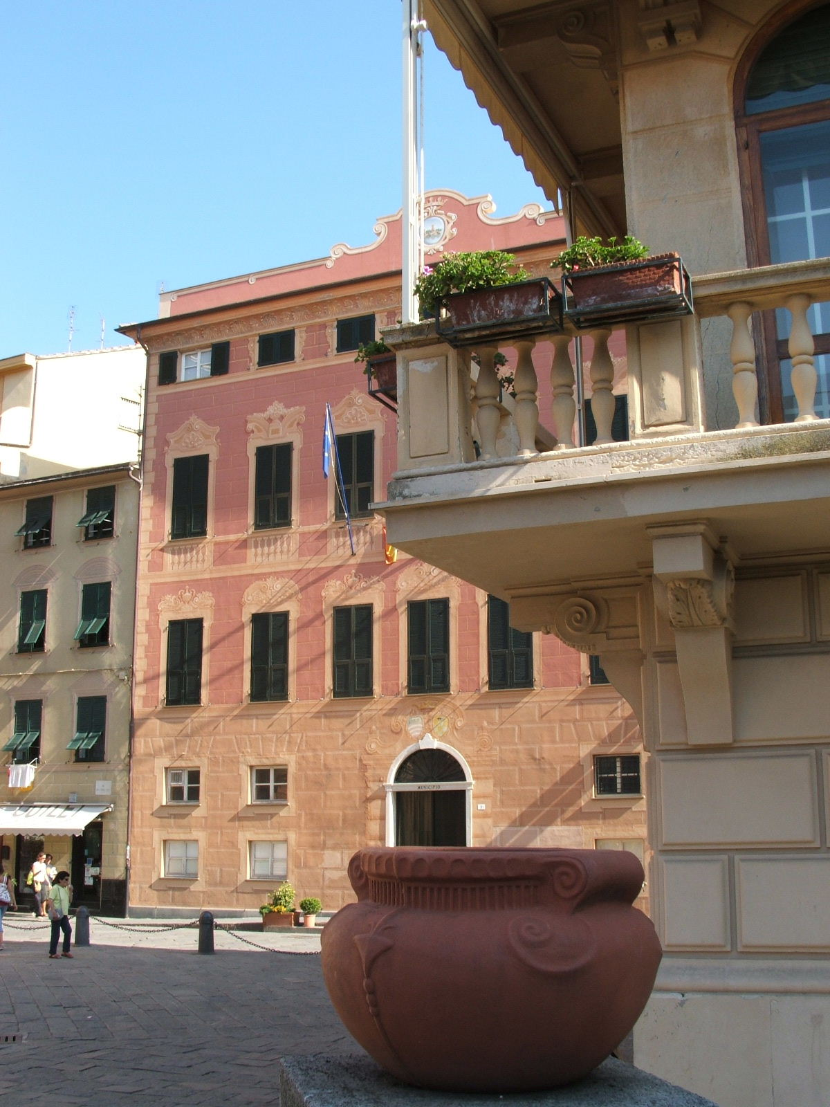 Immagine da Sestri Levante